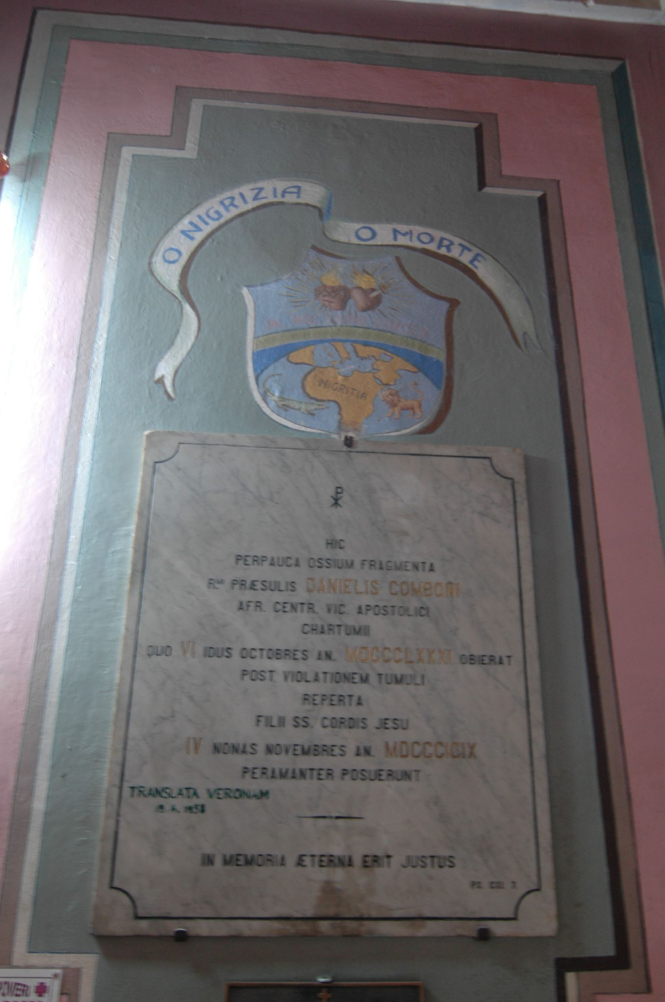 il motto dei Comboniani: Nigritia o Morte (sa un pò di garibaldino a dir la verità).